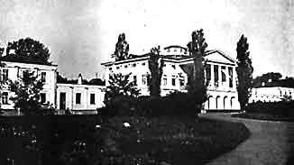 Grafskoye, the stately home of the Counts Gendrikov Усадьба Графское в селе Андреевка Волчанского уезда Харьковской губернии